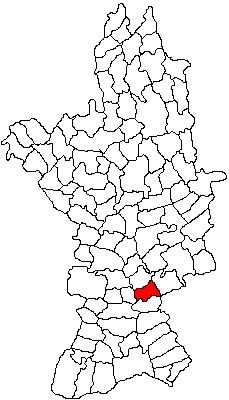 Categorie:Hărţi ale judeţului Olt